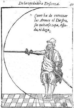 Ilustración del libro sobre la Verdadera Destreza de Jerónimo Sánchez Carranza. Cómo ha de ejercitar las armas el diestro, sin quitarse la capa, espada, ni daga